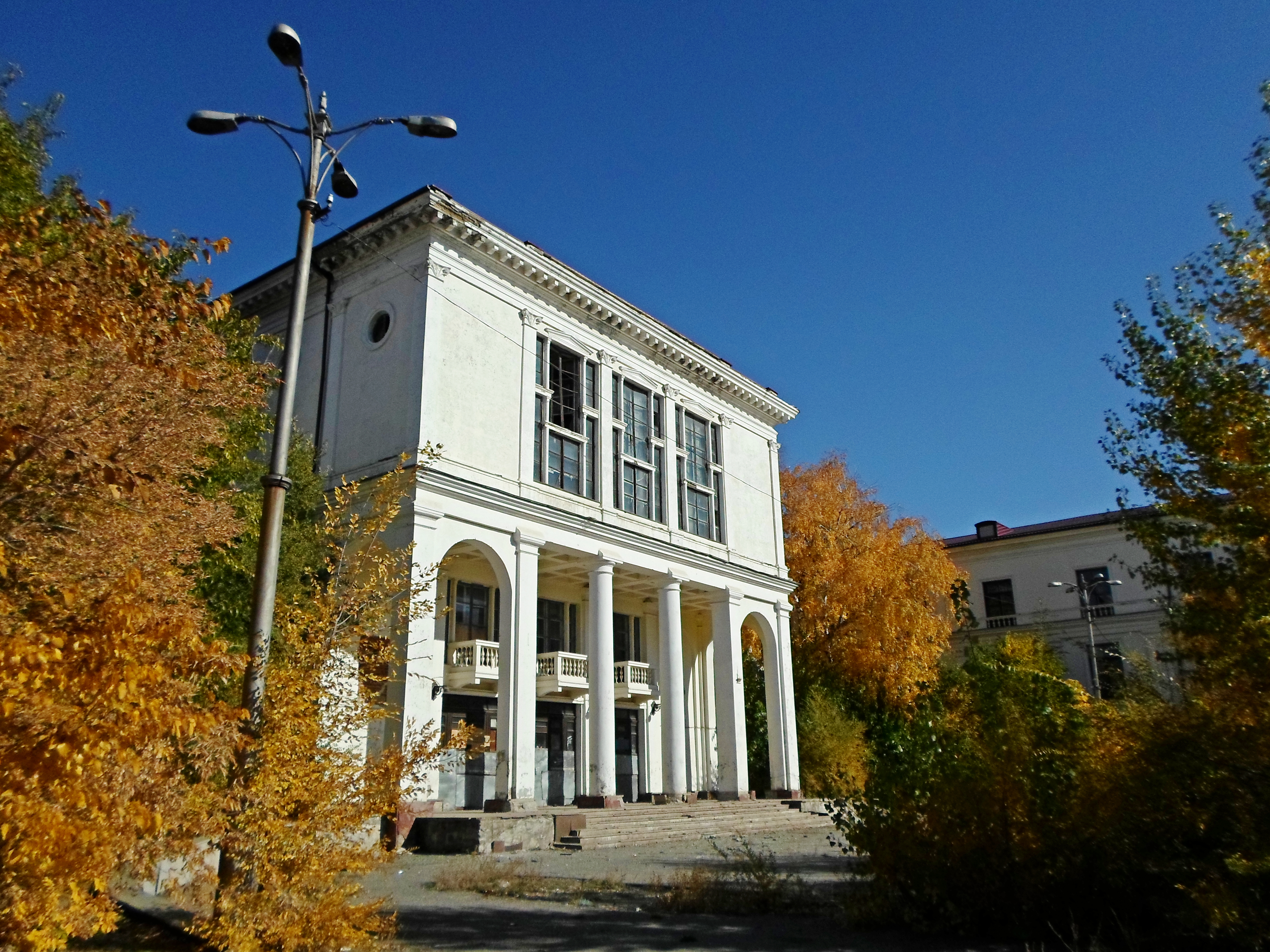 Дом культуры и техники ВгТЗ (г. Волгоград, ул. Ушакова, 5)